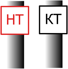 Железнодорожные сигналы «Начало торможения», «Конец торможения»